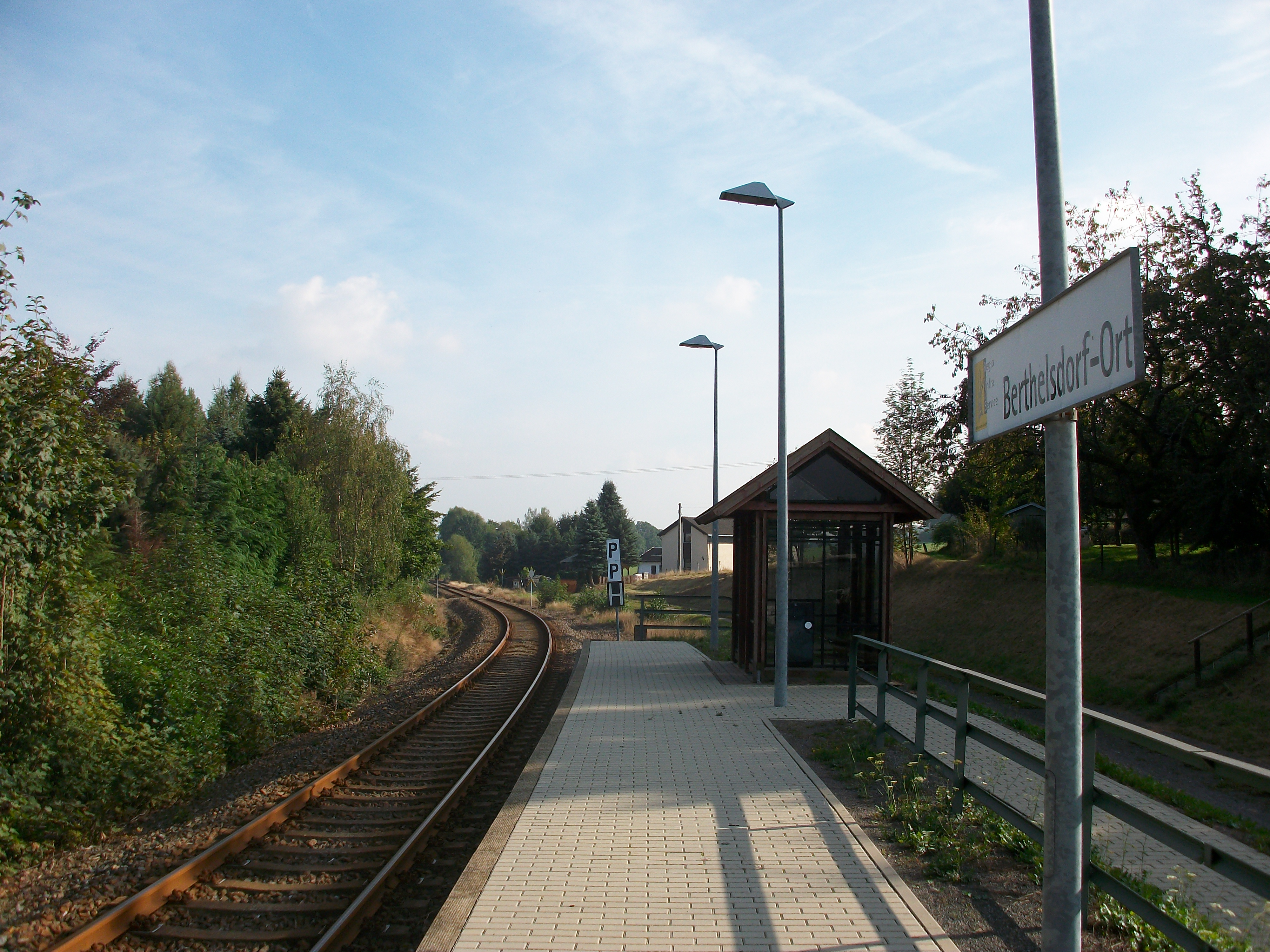 Haltepunkt Berthelsdorf (Erzgeb) Ort (2016)